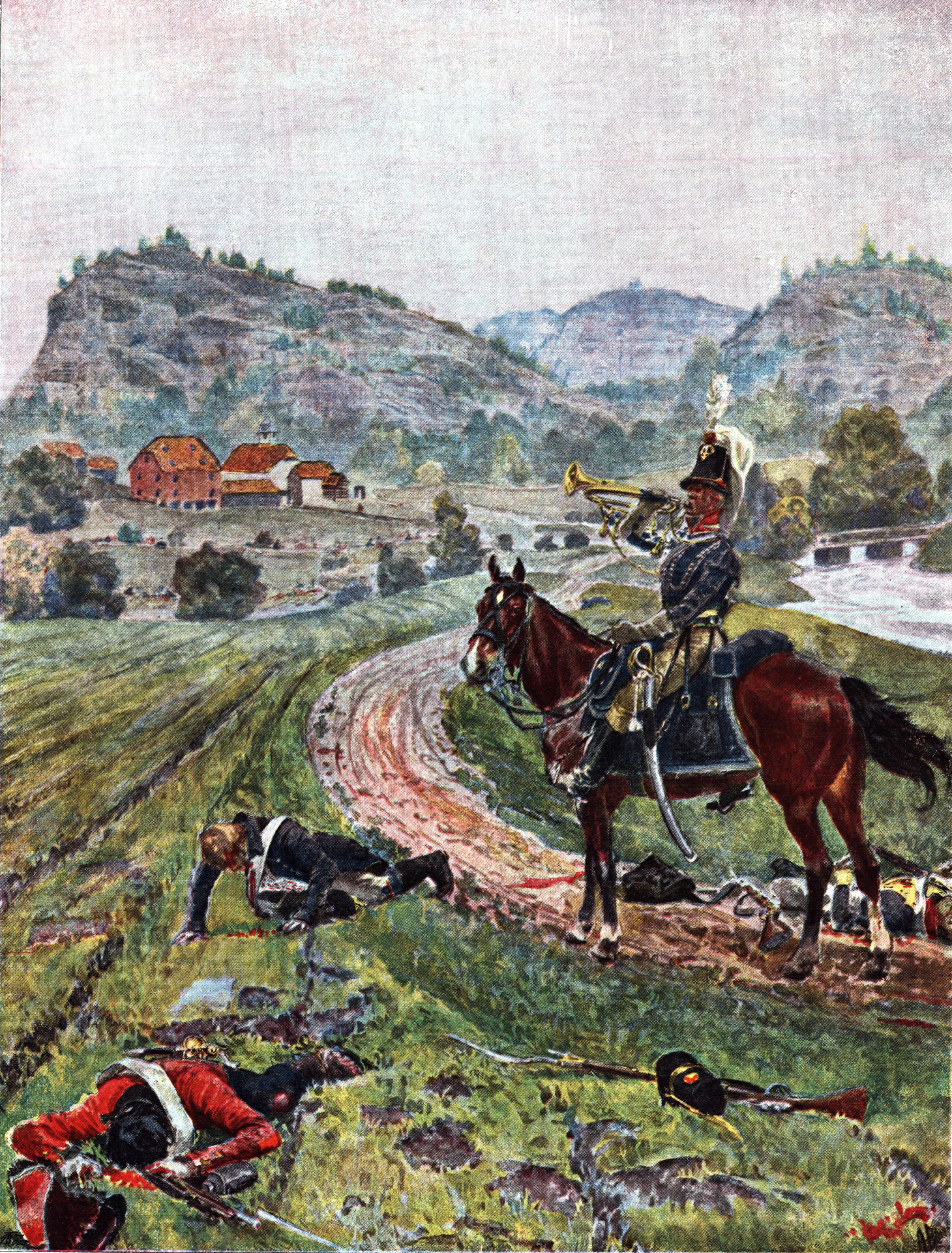 Kampen ved Berby 12. september 1808